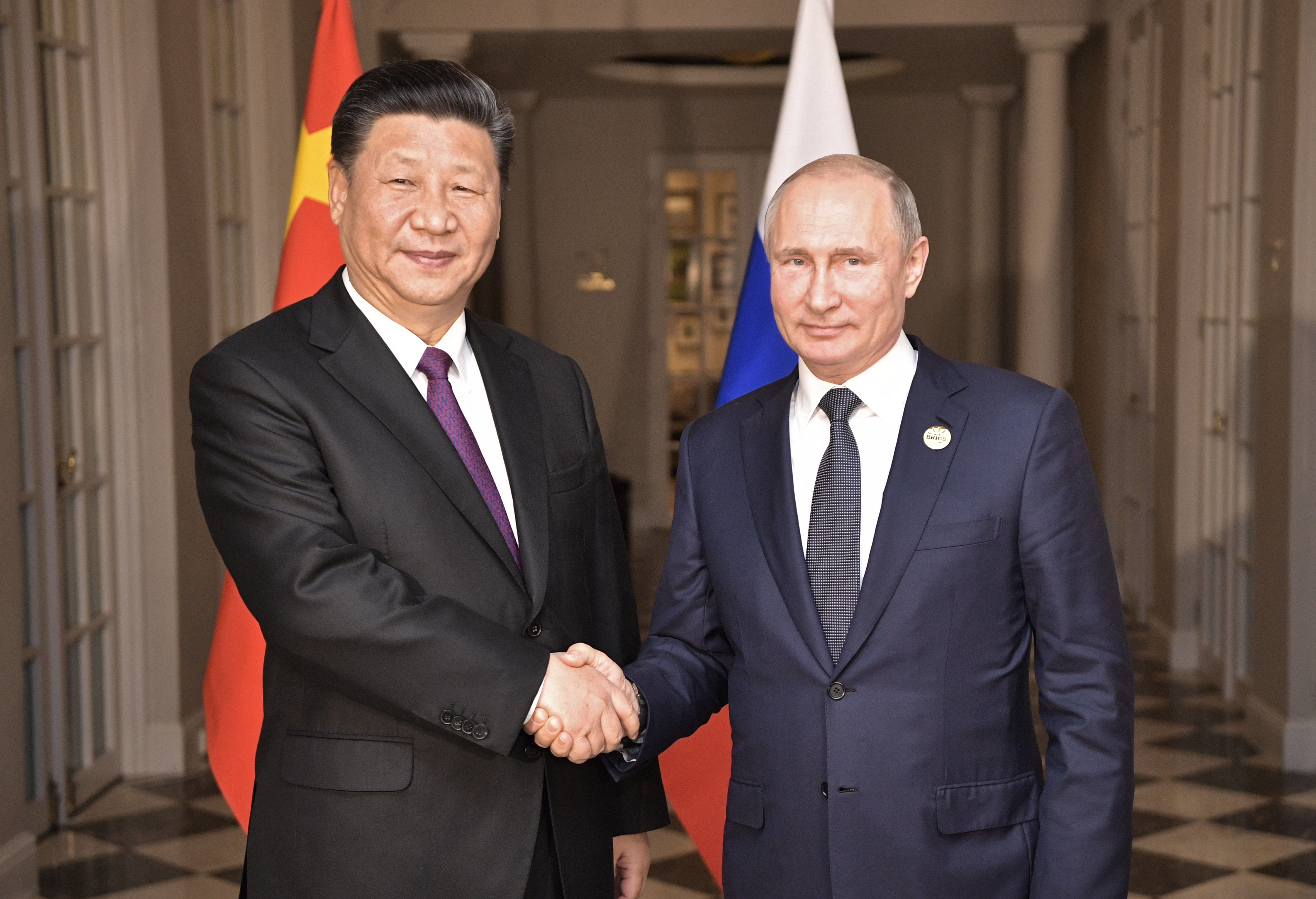 С Председателем КНР Си Цзиньпином.